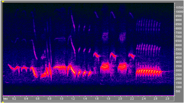 Sonagramme d'un chant de merle bleu réalisée par logiciel (copie d'écran) Auteur : moi-même (Dbfls 11 février 2006 à 14:58 (CET)) Libre de droit Actuellement sur site "Physique-Musique" archivé sur Edutice